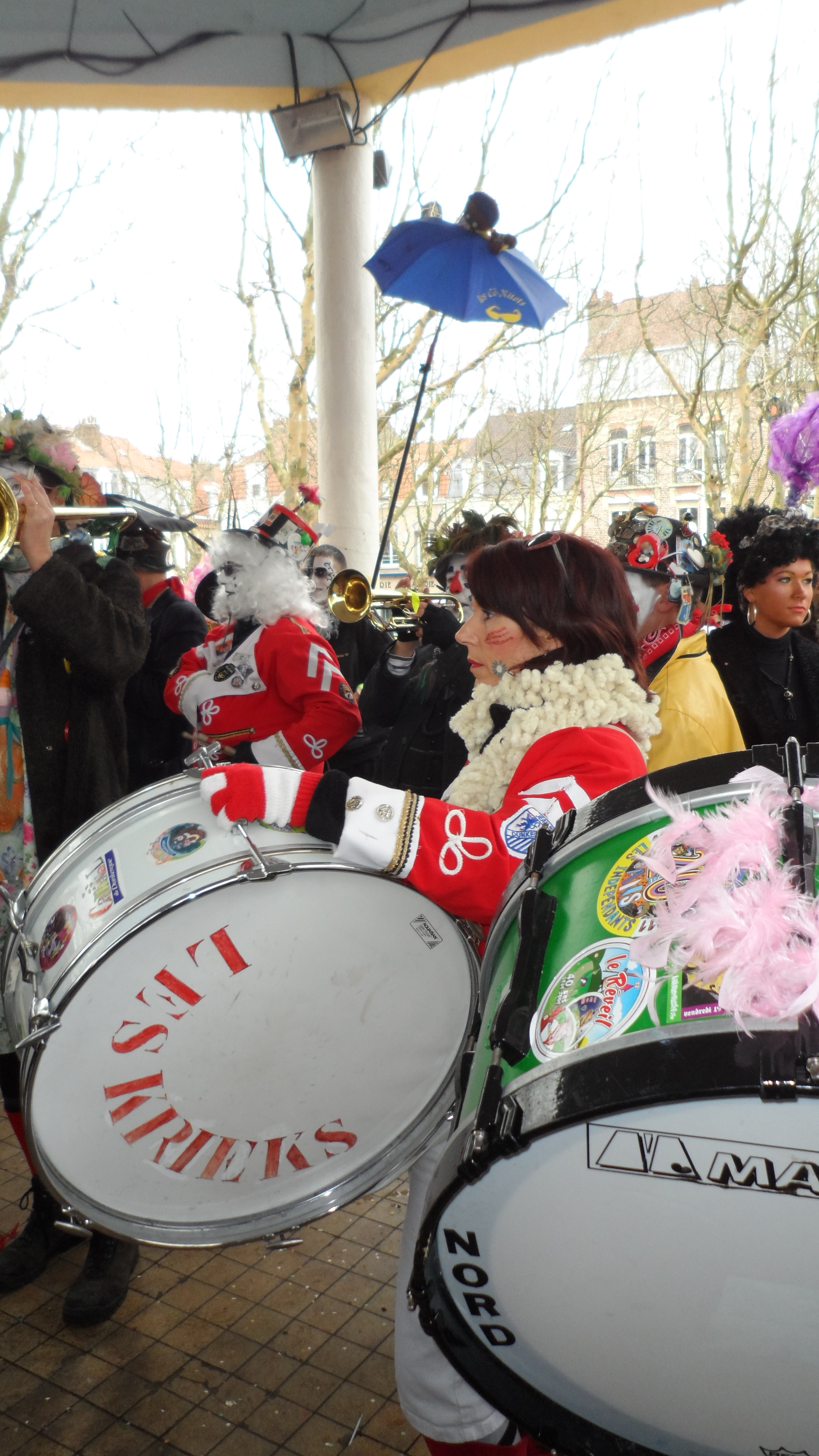 Joueuse de grosse caisse lors de l'avant bande de Malo-les-Bains